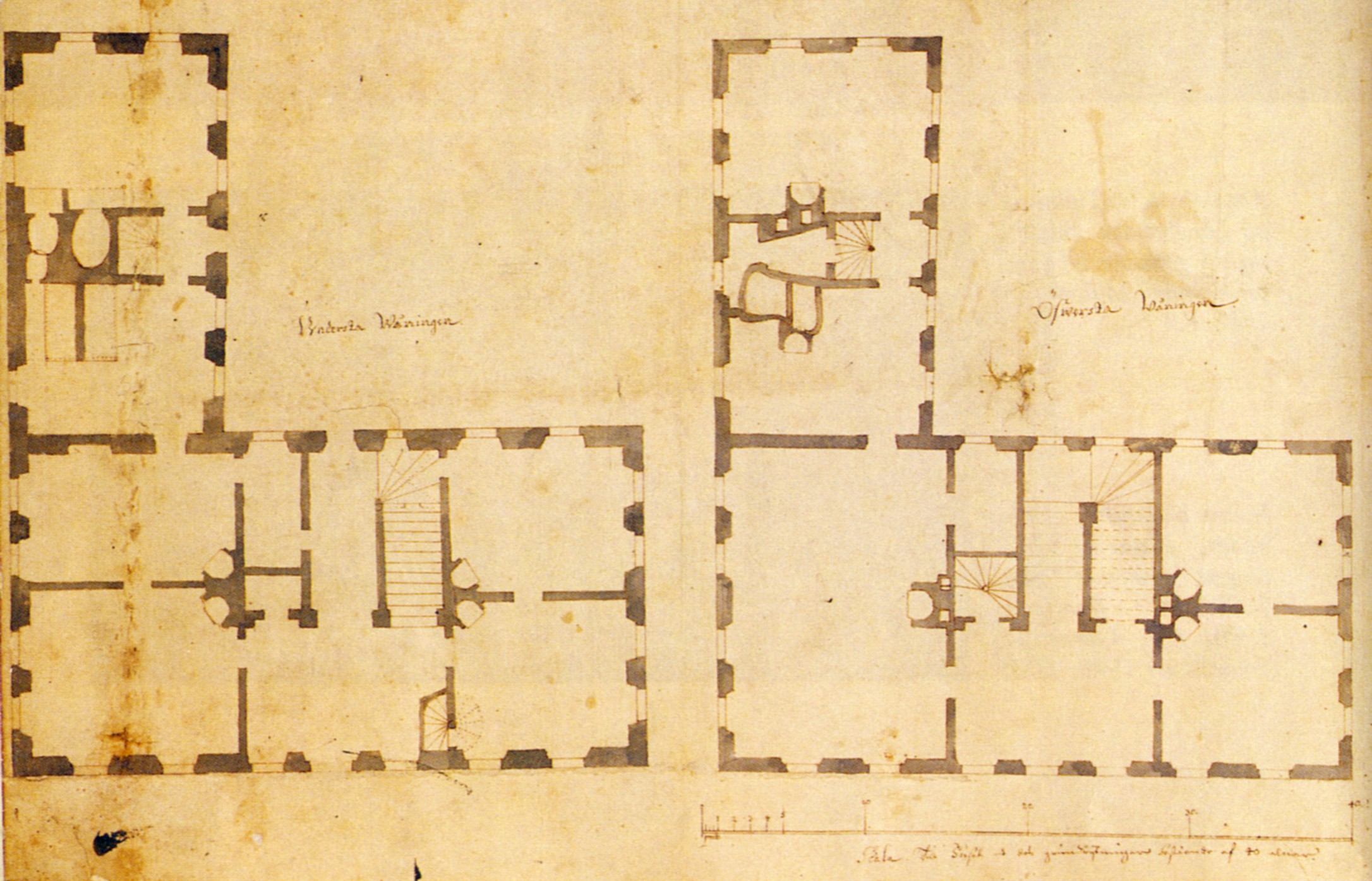 Malmgården Alstavik på Långholmen, planer